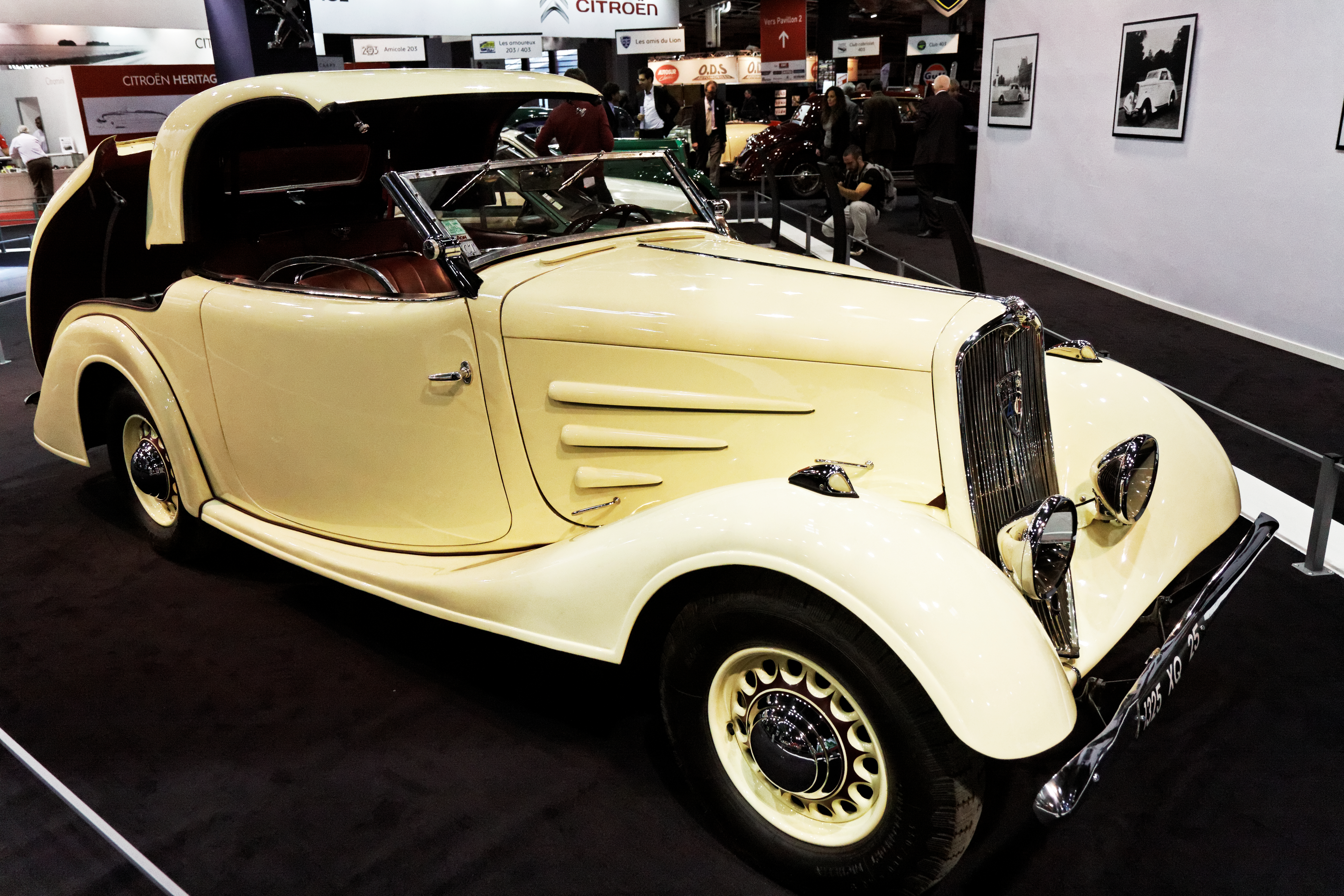 Une Peugeot 401 Coupé transformable Eclipse présentée lors du salon Retromobile 2013.